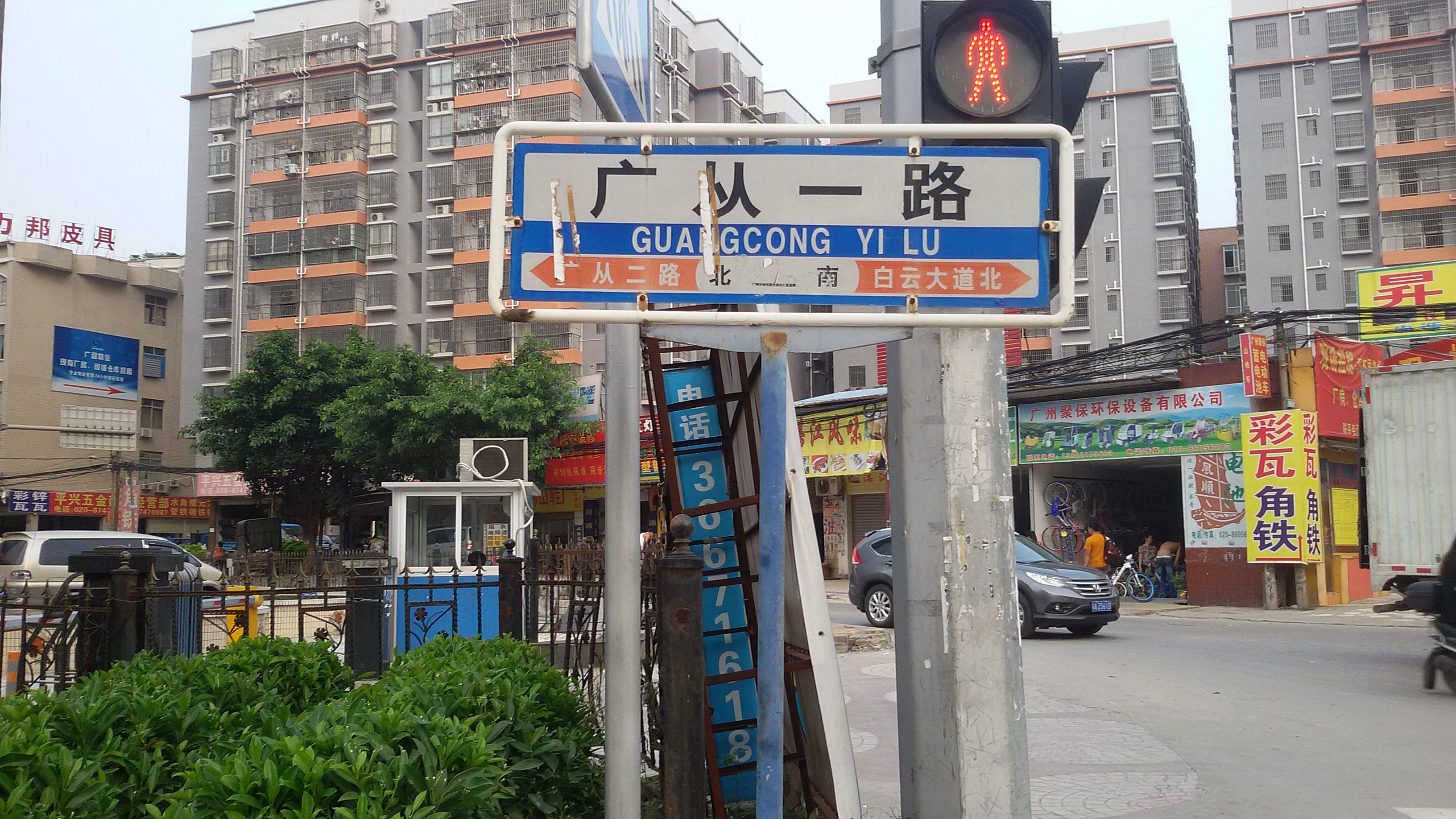 粵語: 廣從一路嘅路牌（呢個係舊嘅廣州路牌，喺街邊幾乎搵都搵唔到幾嚿。）